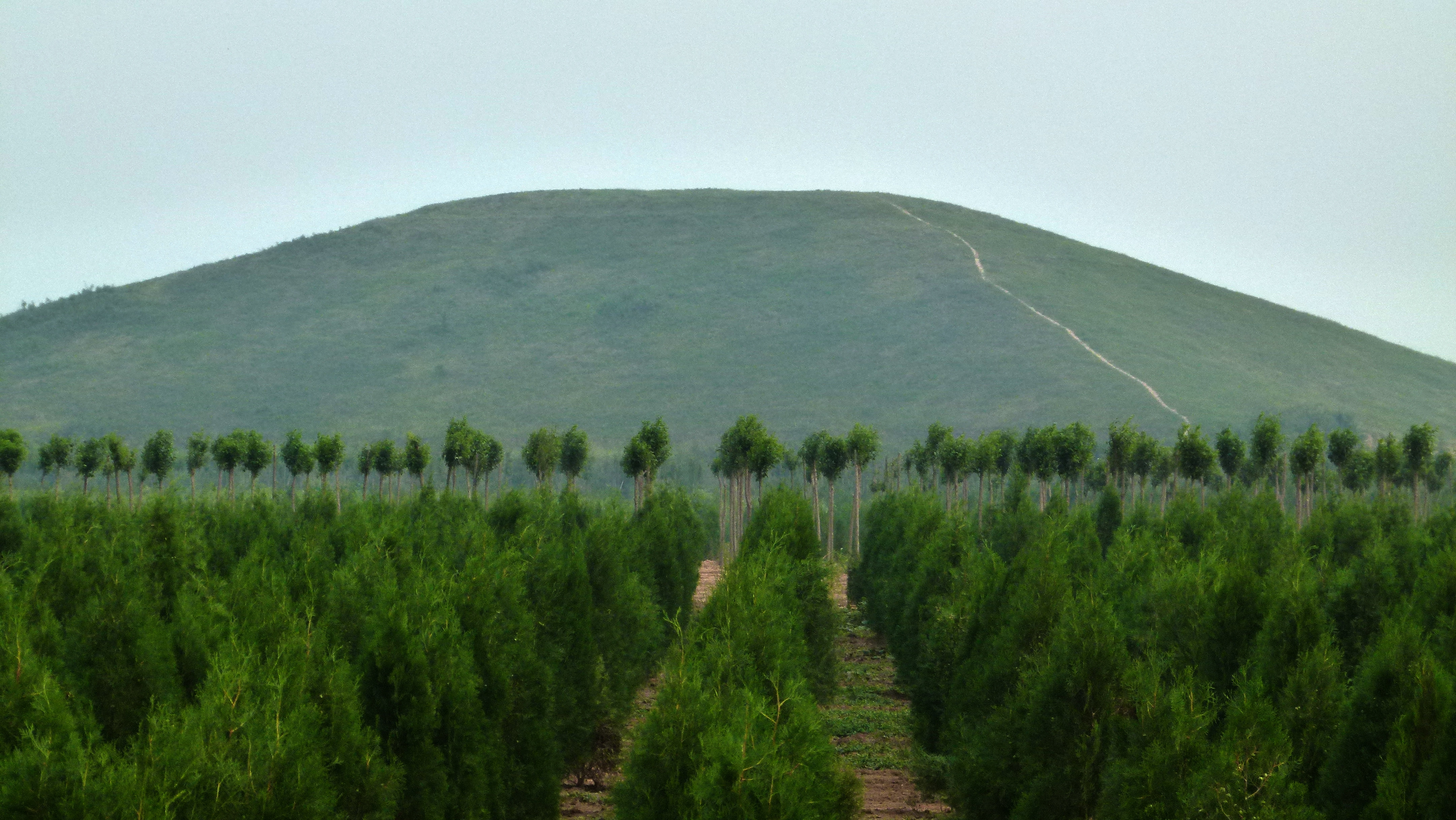 Changling - Grab der Kaiserin